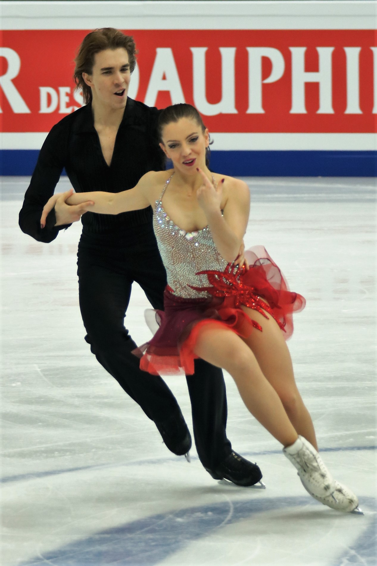 Виктория Манни и Карло Рётлисбергер (Швейцария) на Чемпионате Европы по фигурному катанию 2018.